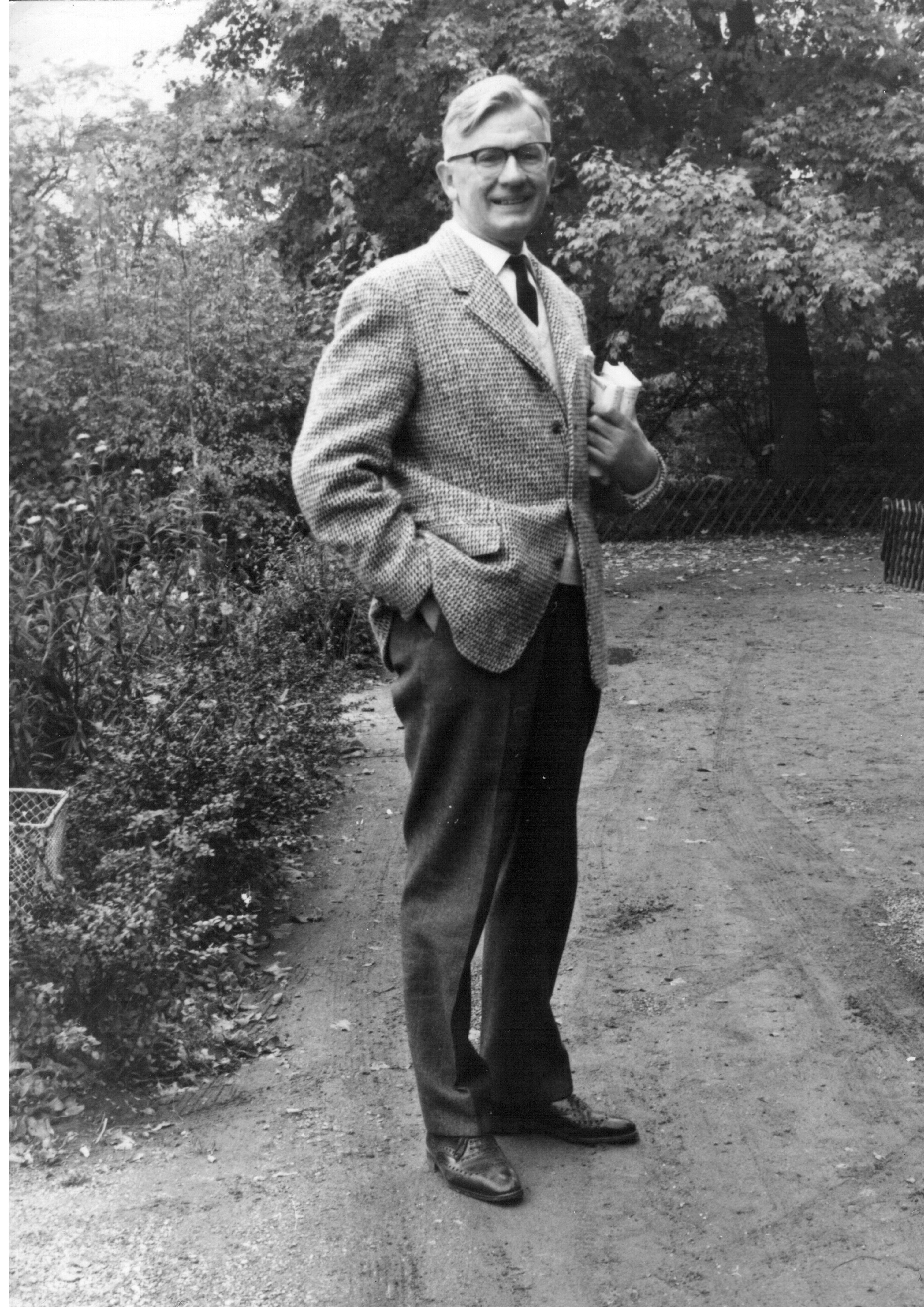 Rudolf Horn (1903-1984), deutscher klassischer Archäologe, Ordinarius an der Universität Göttingen